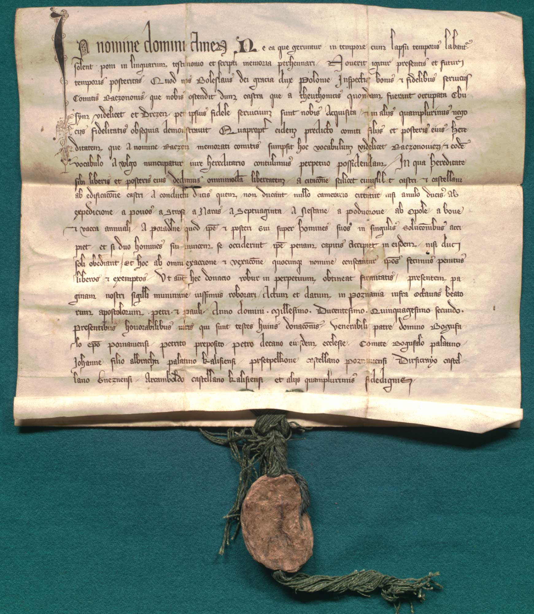 Bolesław, ks. polski, nadaje komesowi Raczonowi po odzyskaniu okupowanych przez zakon krzyżacki grodów Zbąszyń i Drczen [Drezdenko] wieś Rakoniewice. Język: łac. Opis zewnętrzny: oryg., 1 k. pergaminowa, 30,5 x 26 + 3,5 cm; pieczęć na sznurze. Data: 1252.06.30-1252.07.05